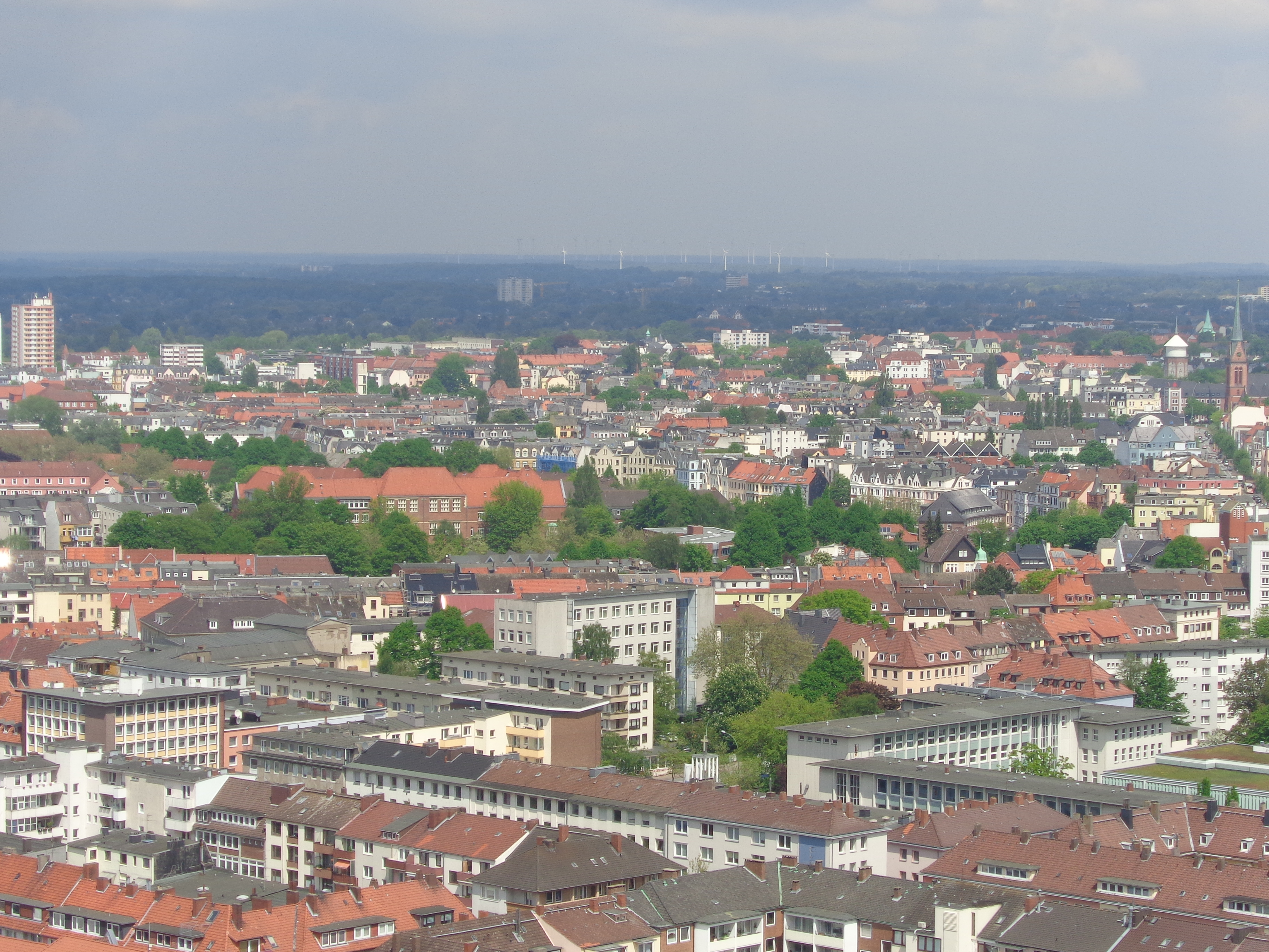 Bremerhaven, Blick vom Atlantic Hotel Sail City auf die Stadtteile Mitte und Lehe